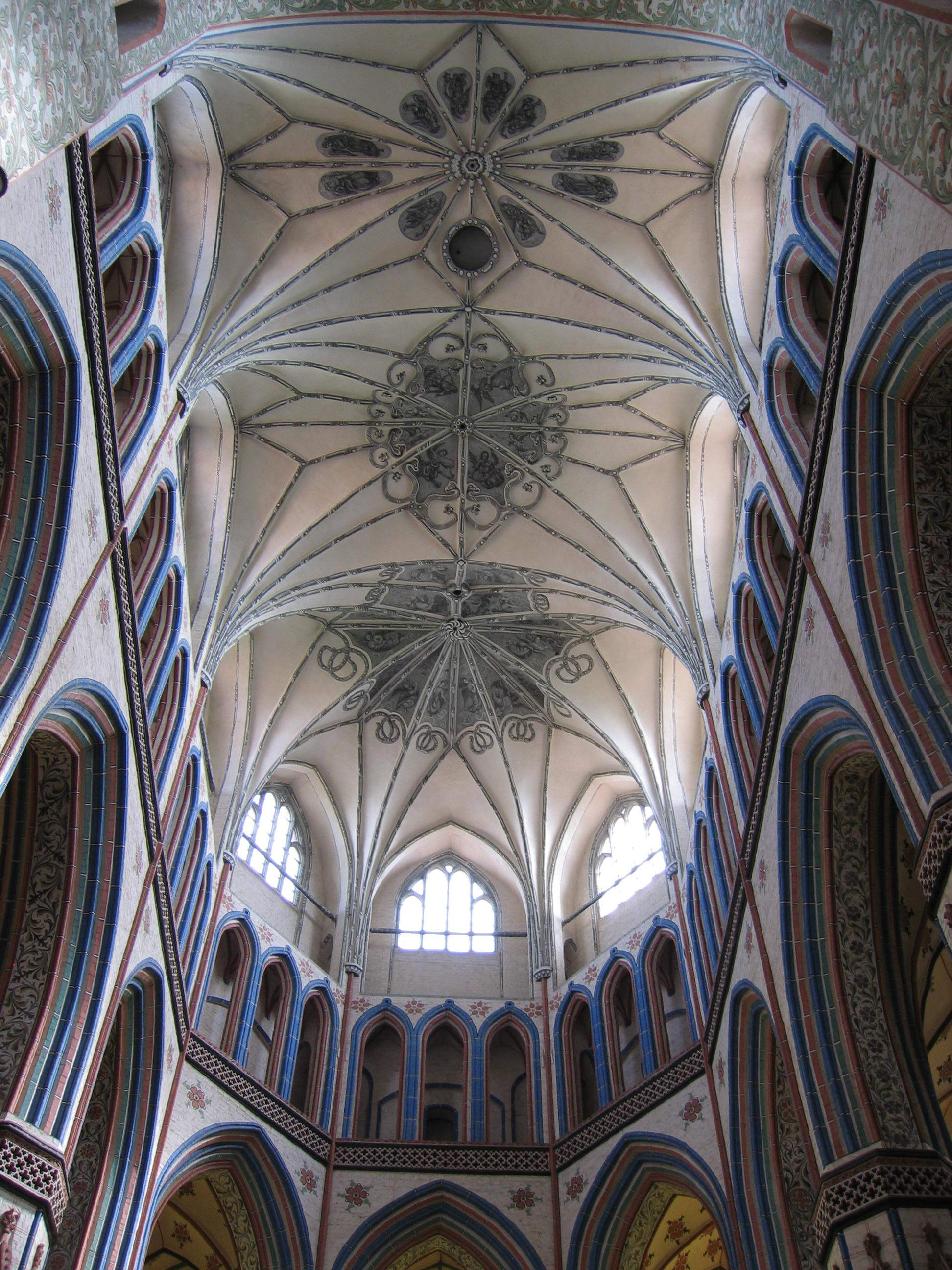 Kolegiata NMP Królowej Świata w Stargardzie - wnętrze